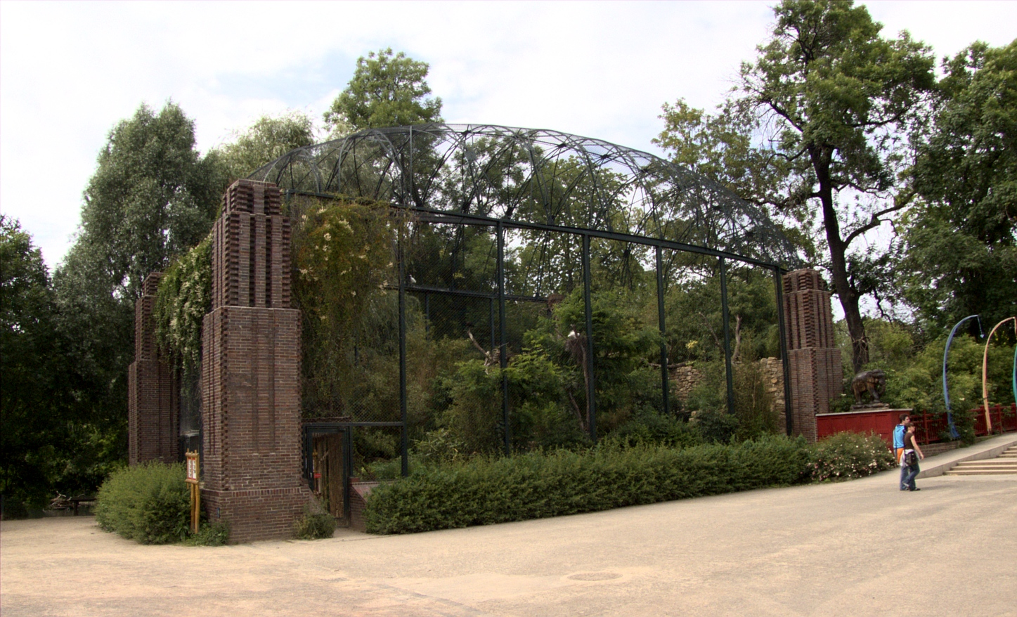 Außenansicht der begehbaren Freiflugvoliere im asiatischen Stil im Zoo Leipzig.